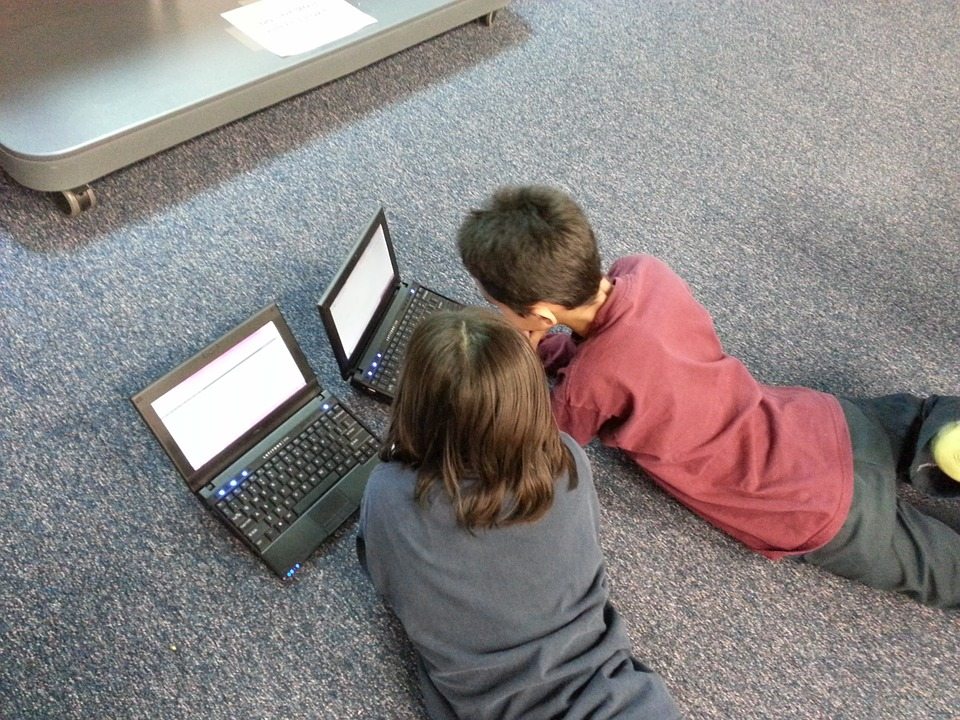 Dos infantes interactúan con dos computadores